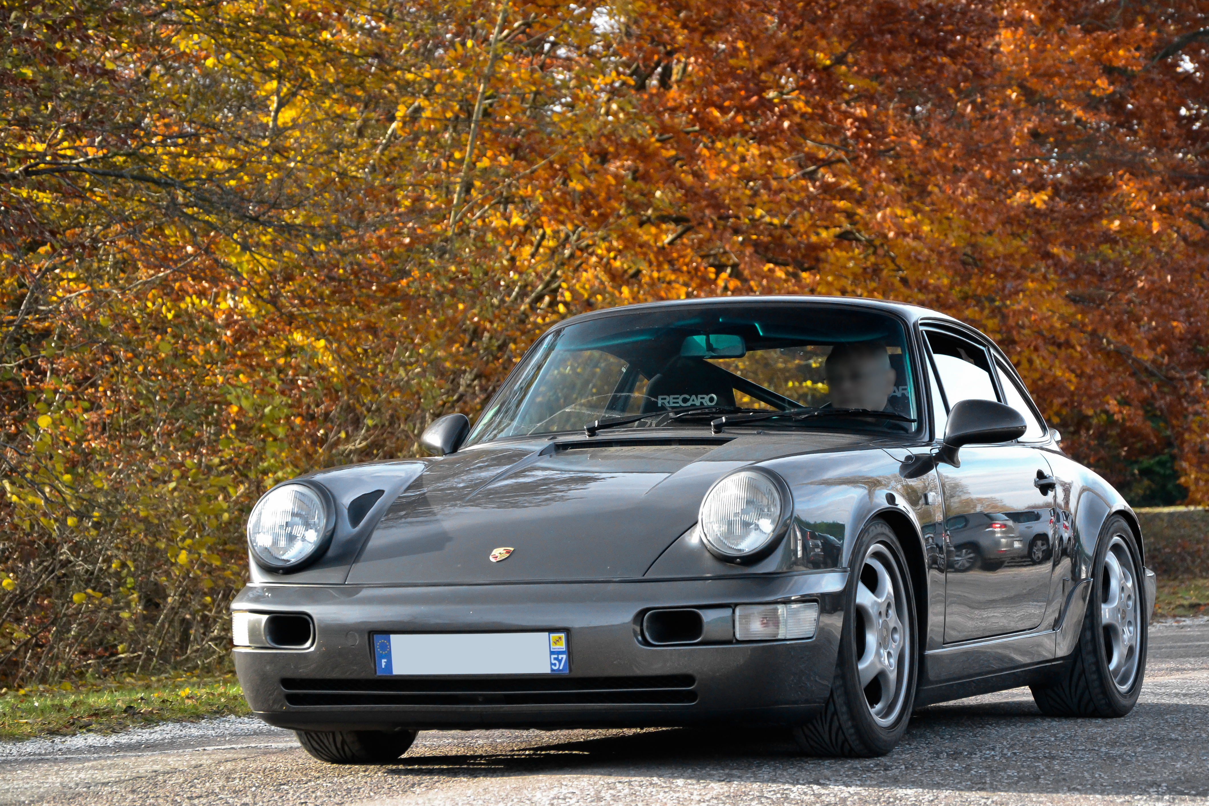 Porsche Carerra